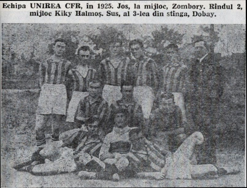 1925 Unirea CFR Timisoara